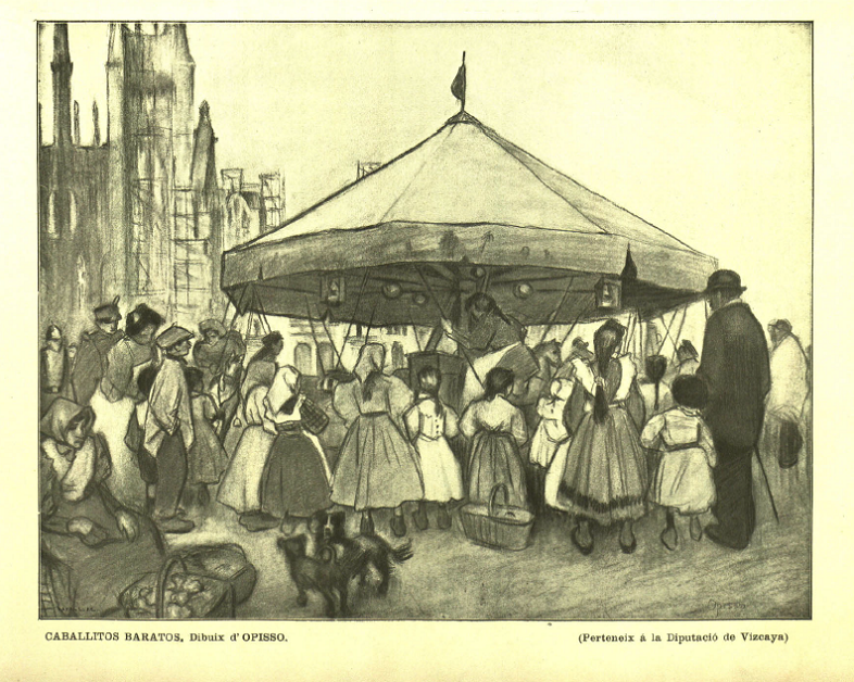 Revista Pèl i Ploma. Número 69. Febrer 1901